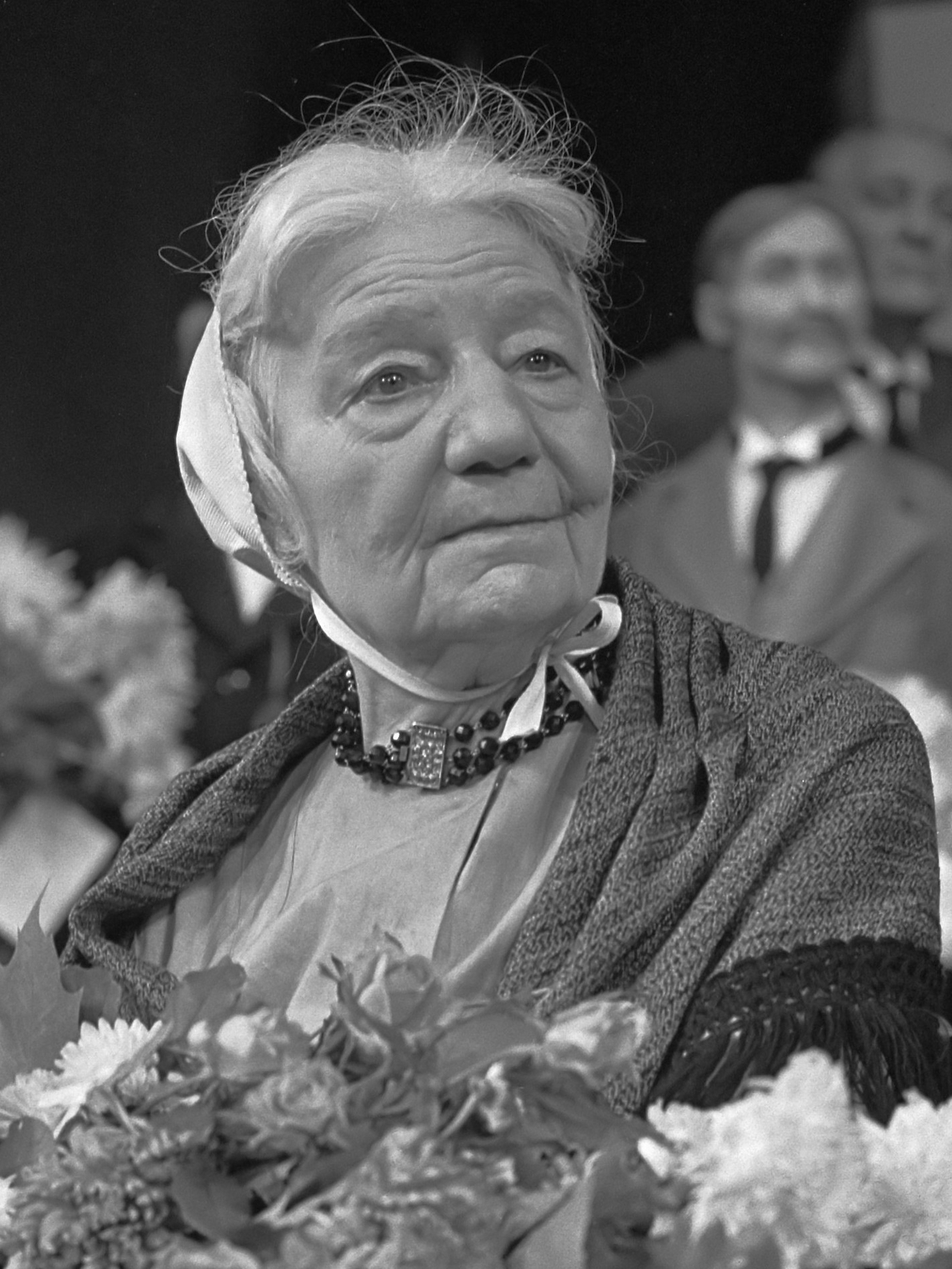 Beppie Nooy gehuldigd na haar laatste opvoering